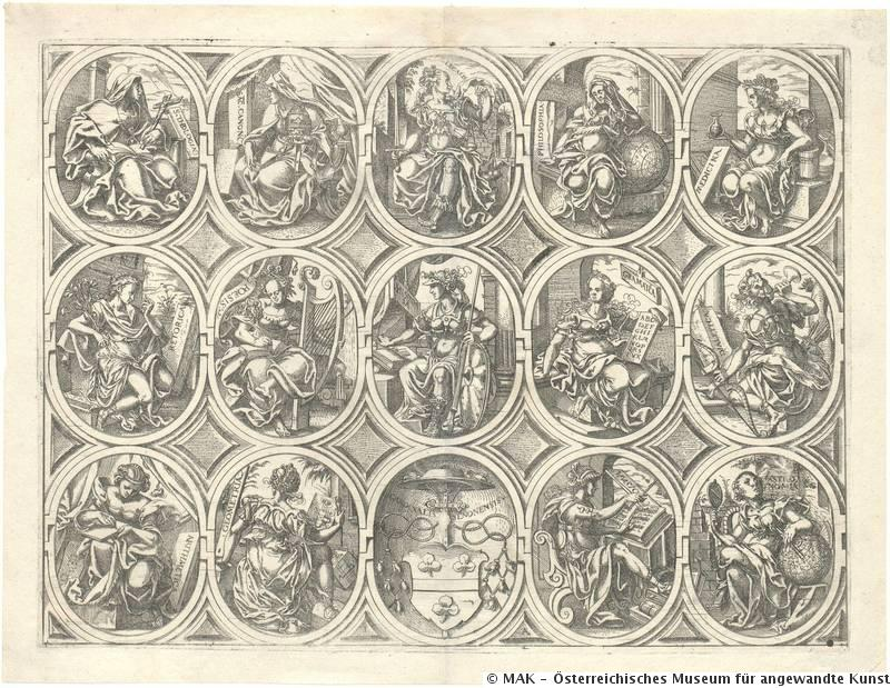 Cassaneus, illusztráció, a tudományok és a művészetek allegóriái a mű 1579-es frankfurti kiadásból, 27 x 36 cm